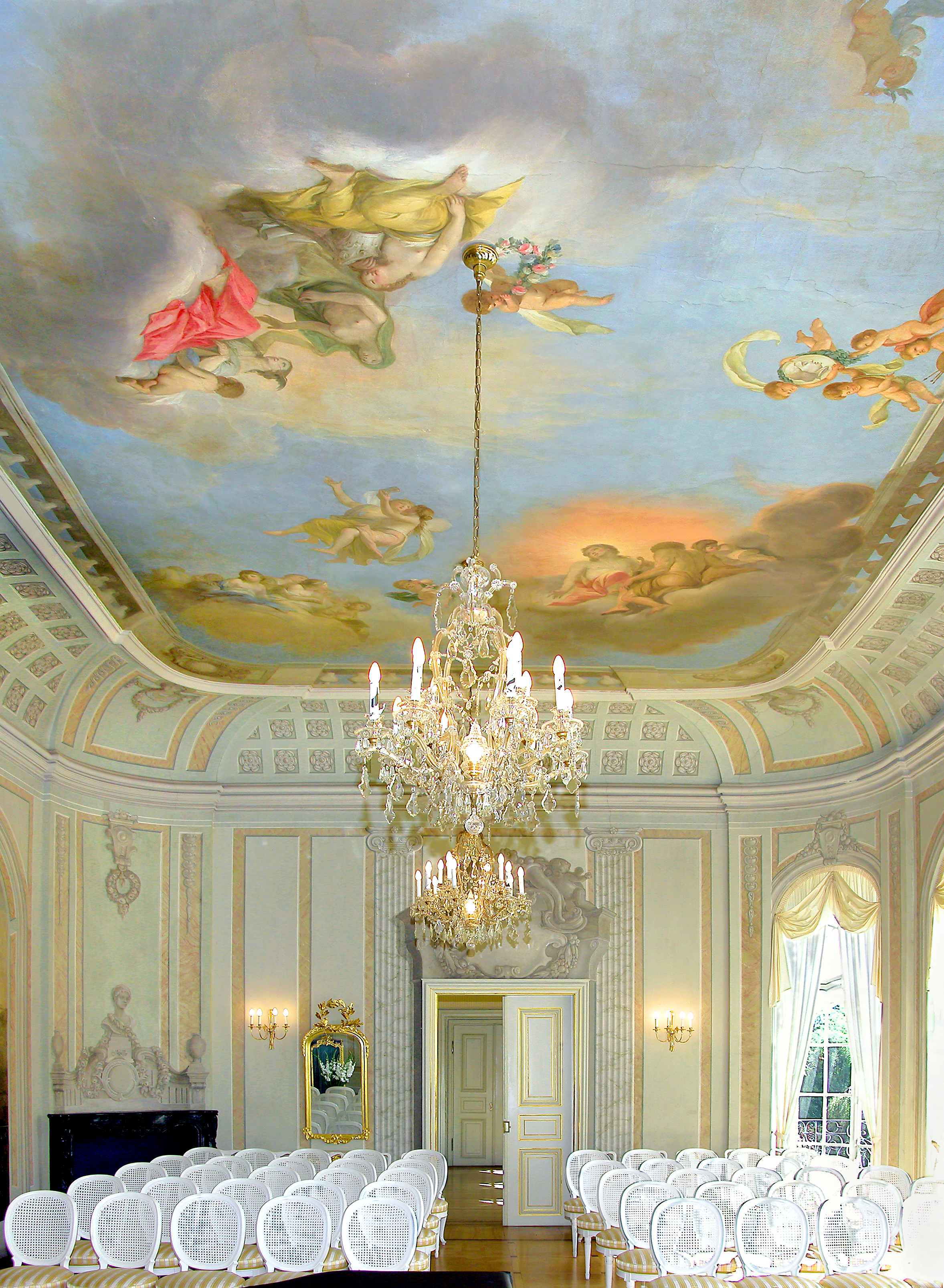 08.09.2009 04155 Leipzig-Gohlis: Gohliser Schlößchen, Menckestraße 23. 1755/56 im Auftrag des Leipziger Rats- herrn und Ratsbaumeisters Johann Caspar Richter nach Plänen von (vermutl.) Friedrich Seltendorff errichtet. Festsaal im OG mit Deckengemälde "Lebensweg der Psyche" von A. F. Oeser. Vollendet 1779 [DSCN38974-38975.TIF]20090908435MDR.JPG(c)Blobelt